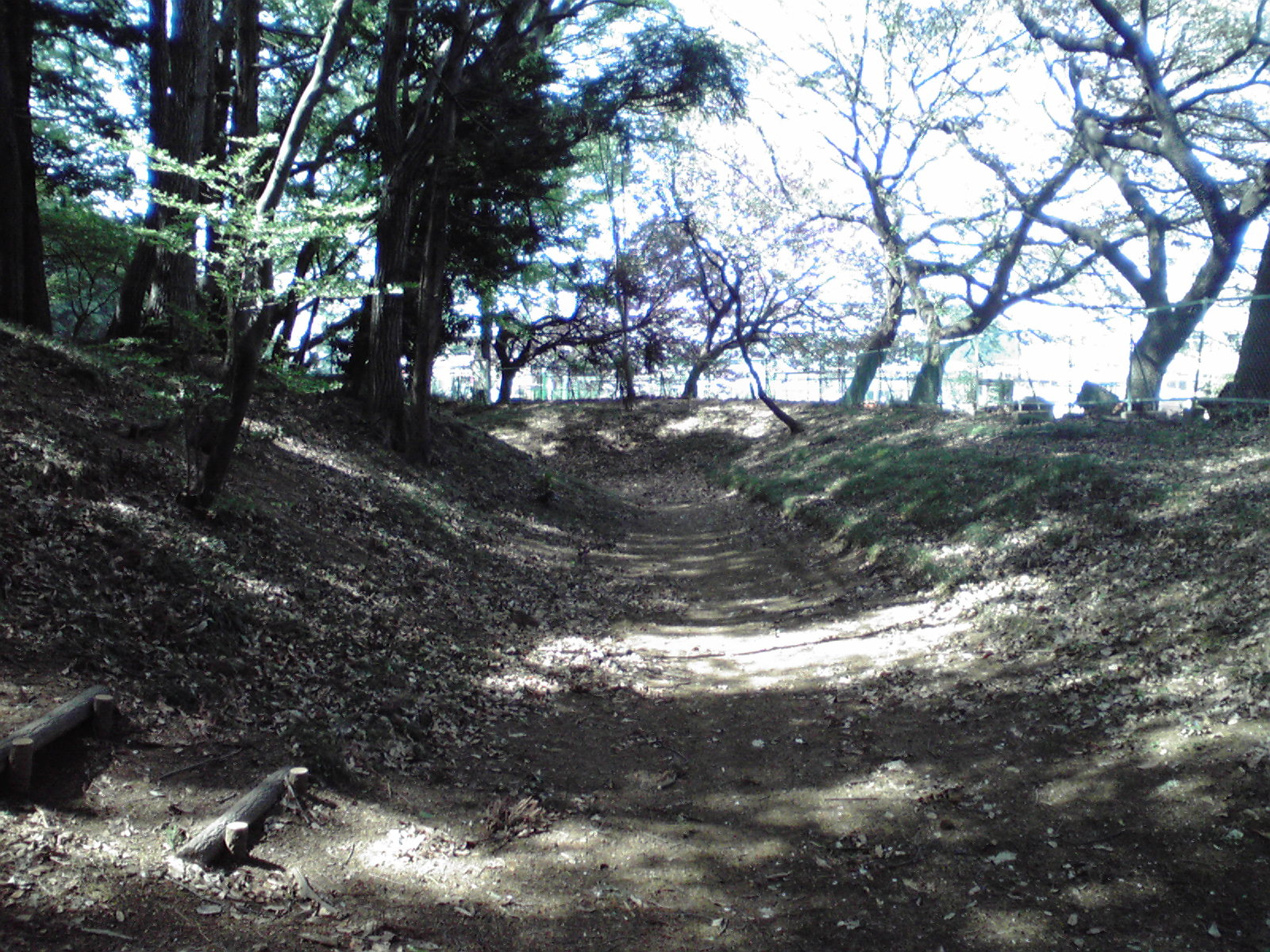 伝源経基館跡にある空堀跡。空堀は西側を除き三方に巡らされている。